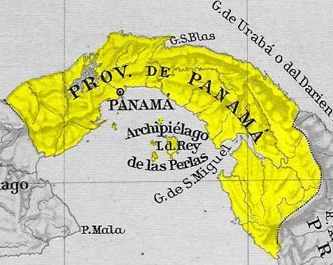 Mapa de la Provincia de Panamá en 1810 y 1830